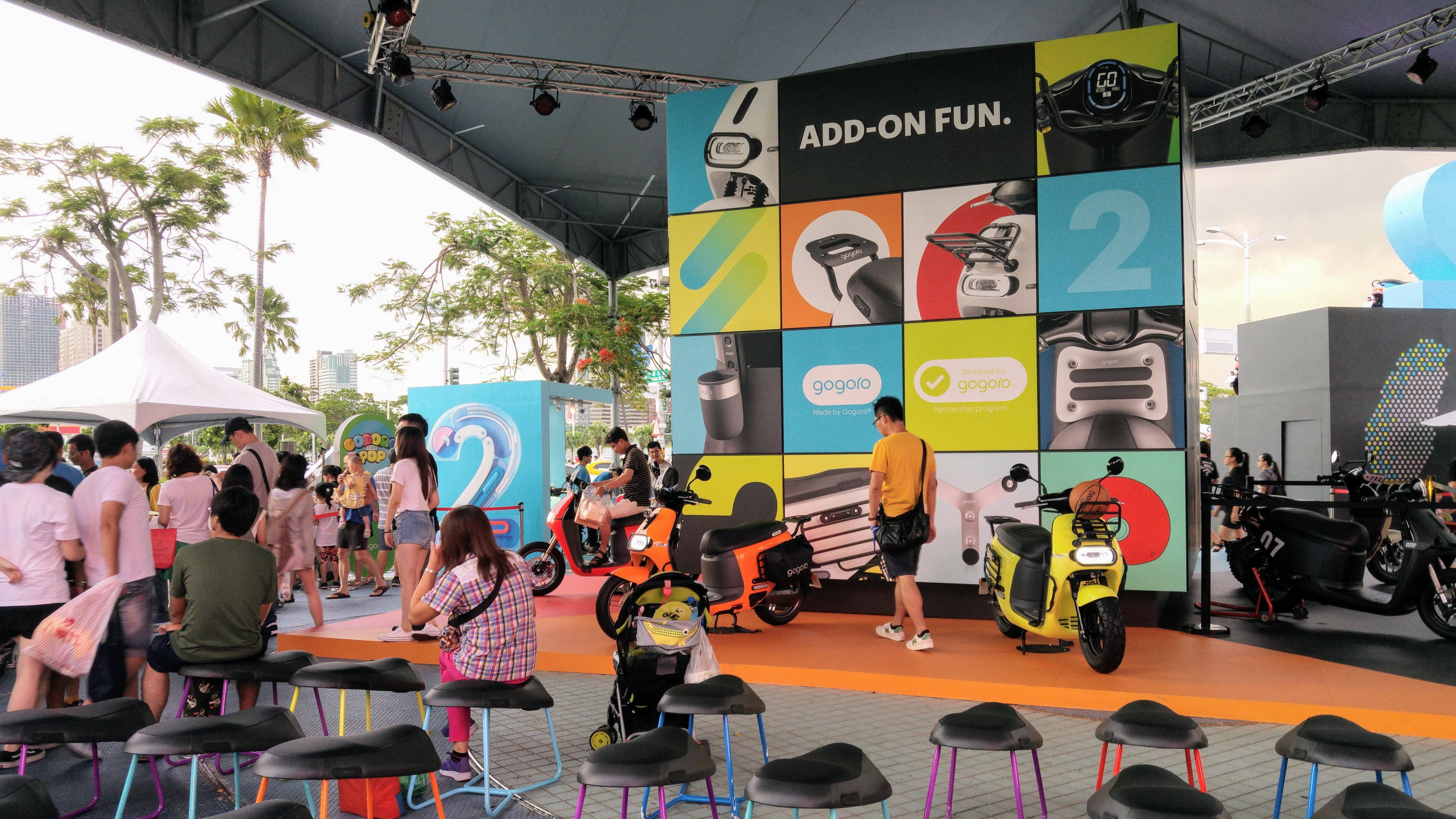 Gogoro 於 Gogoro Wonderland 活動中所採用座椅即是 Gogoro 2 Series 的機車座椅。